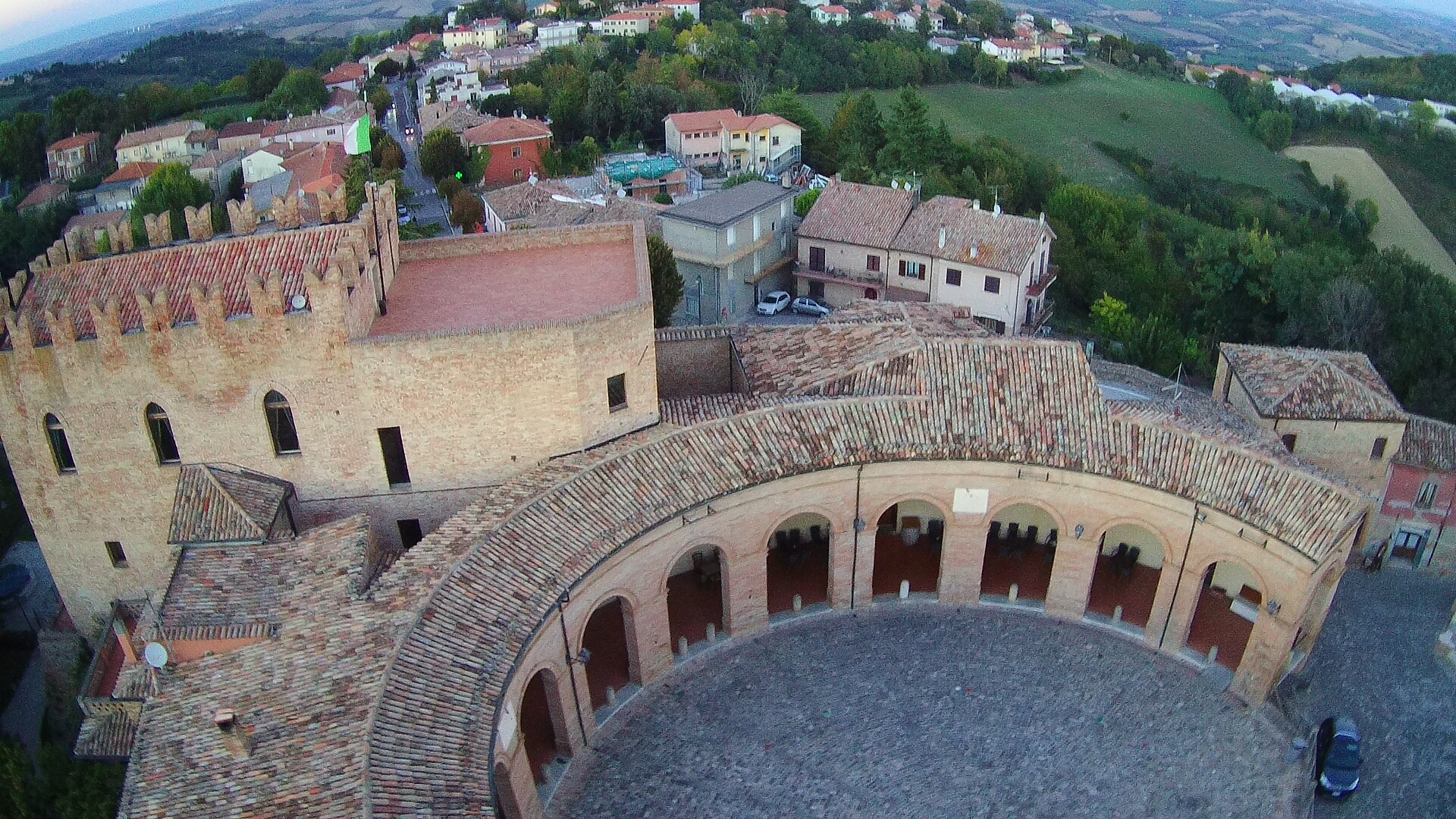 Rocca malatestiana This is a photo of a monument which is part of cultural heritage of Italy.